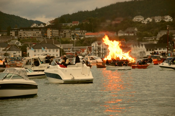 St. Hans bål på ei flåte, lokalt kalt spire. Bildet er fra sankt hans feiringen 23. juni 2011 på fjorden utenfor Flekkefjord sentrum.